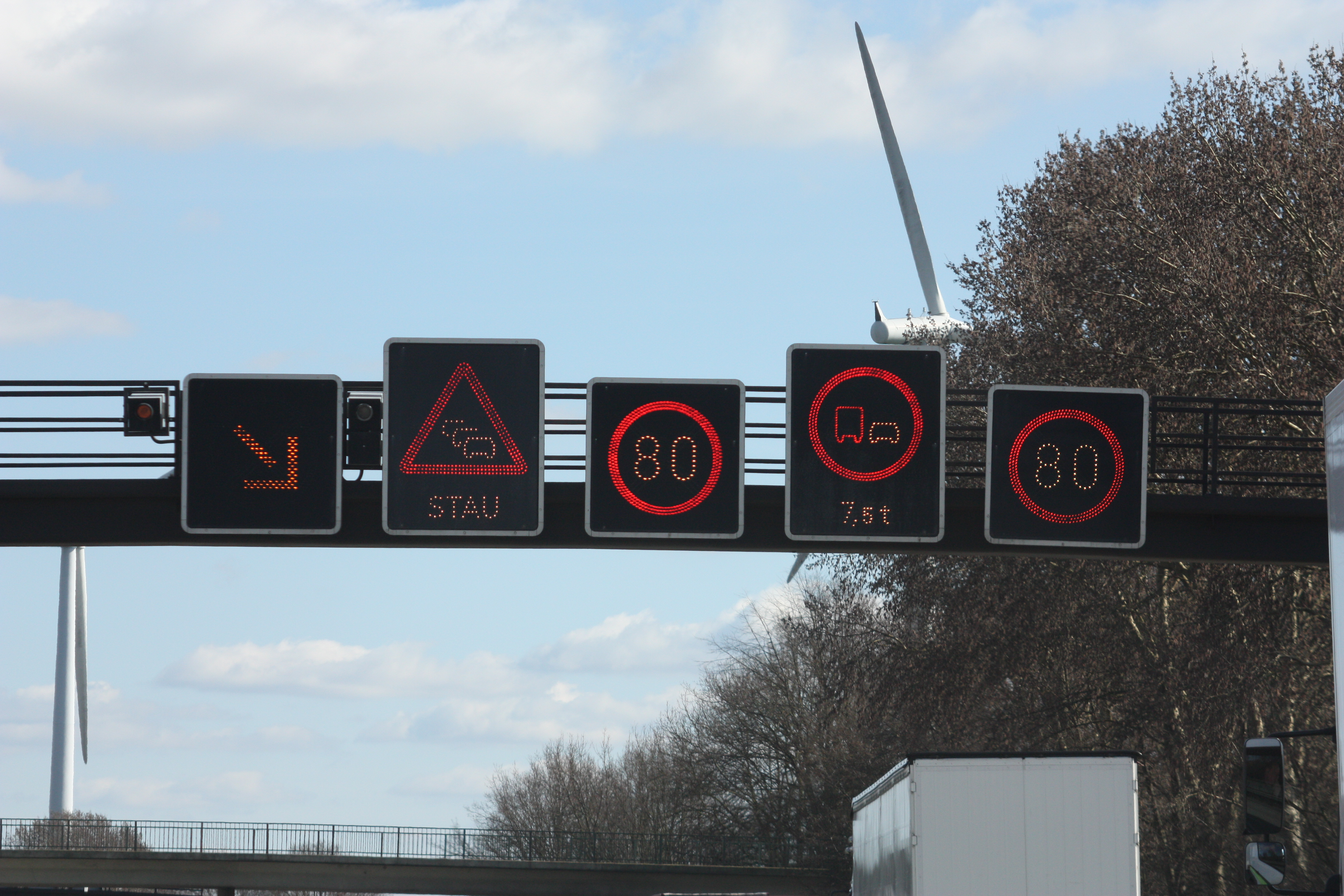 Verkehrszeichen auf der Bundesautobahn